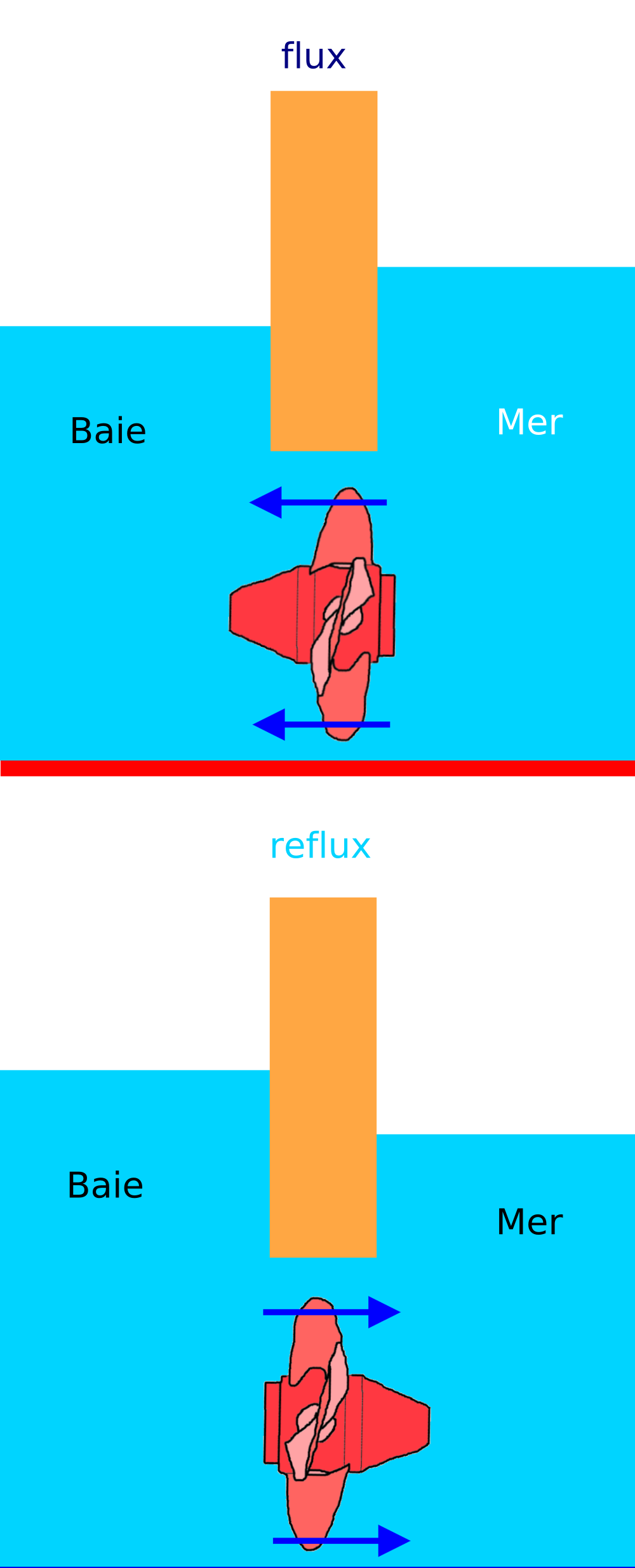 Schéma: Fonctionnement d'une usine marémotrice Dessinateur: DER UNFASSBARE Date du dessin: 04.03.2006 Traduction : Calmos 10:30, 14 September 2006 (UTC)